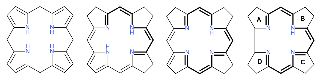 Chromophore der Tetrapyrrole Porphyrinogen, Pyrrocorphin, Corphin, Corrin (mit hervorgehobenem Corrin-Chromophor)